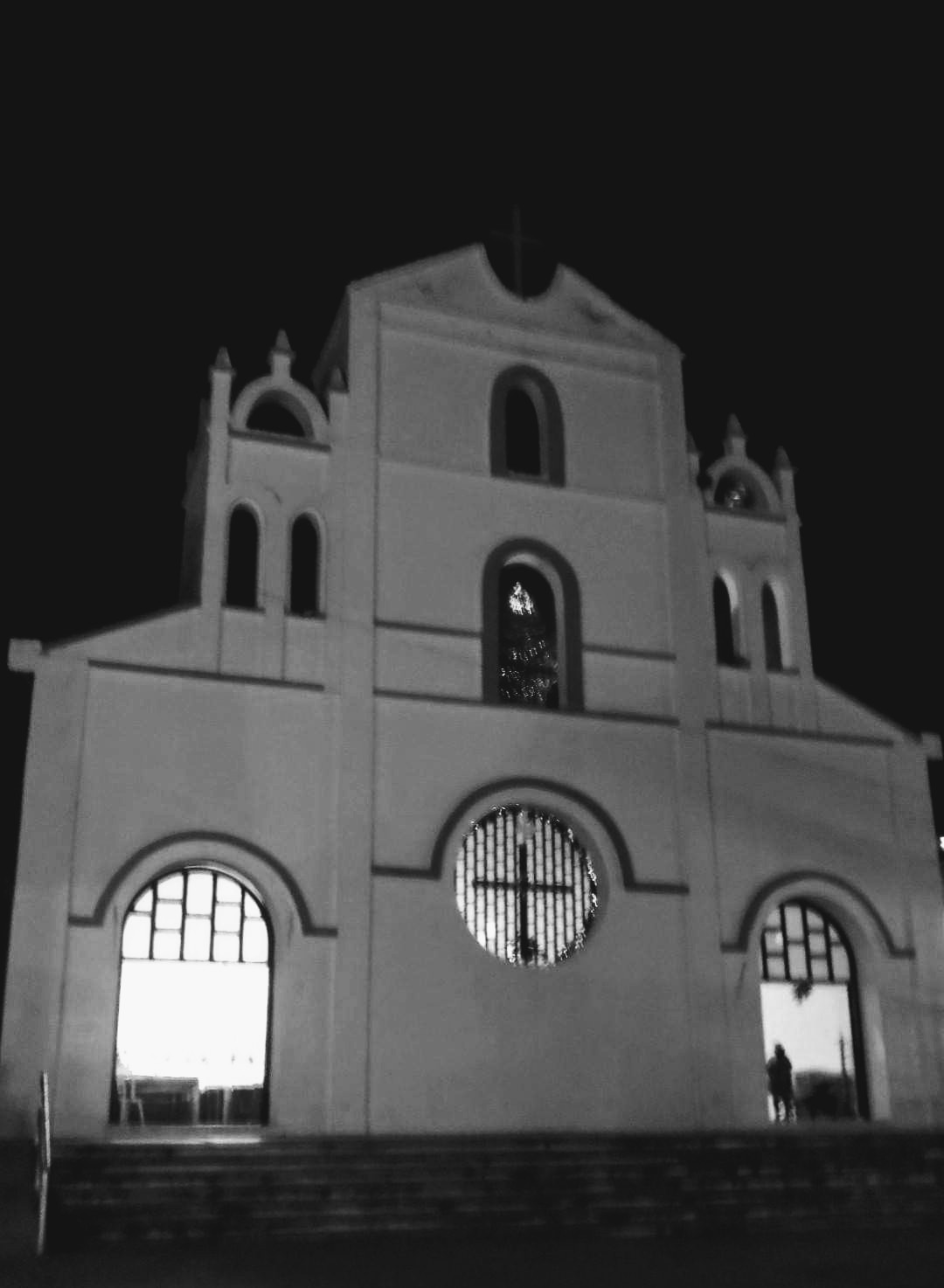 Iglesia actual de San Fernando, Chiapas